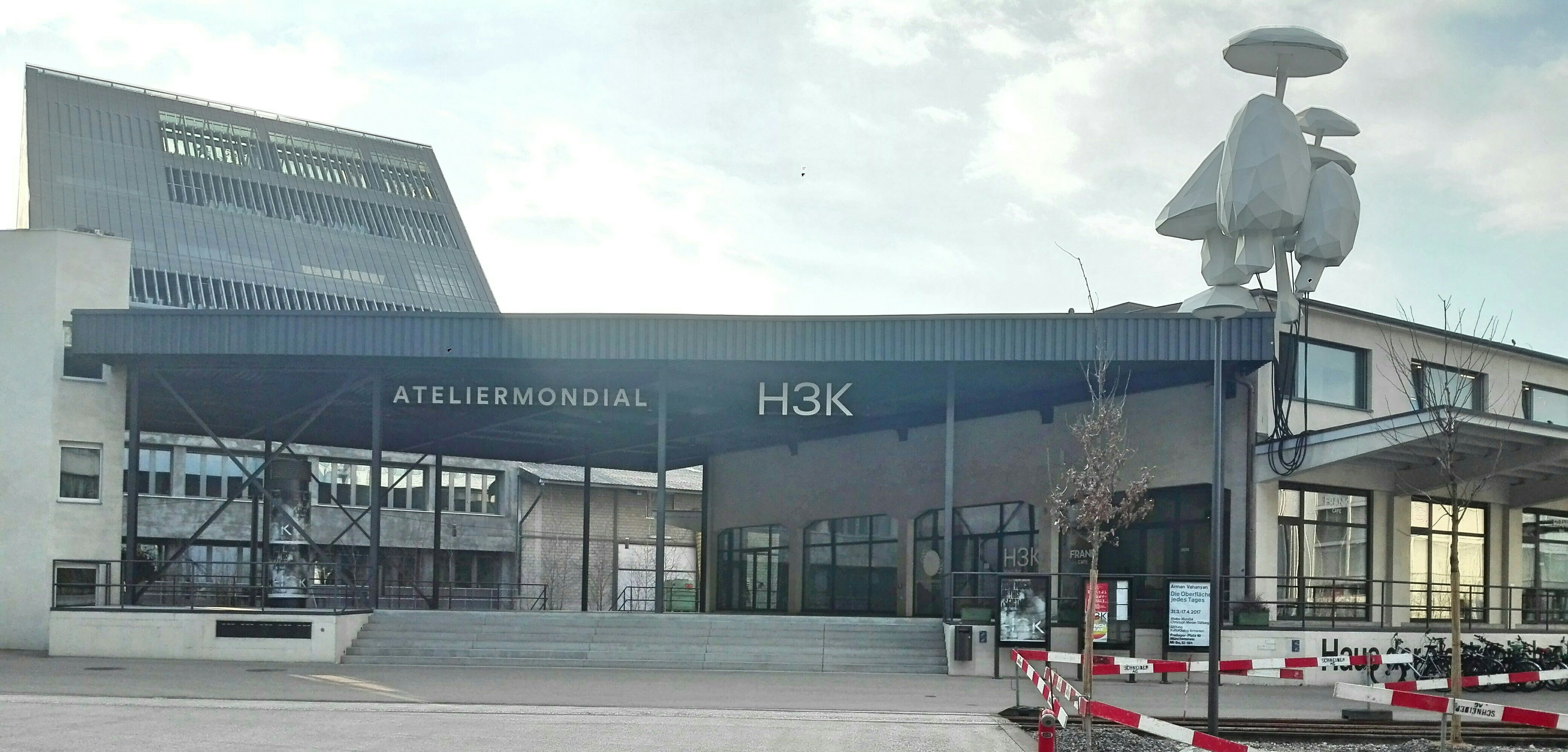 Hochschule Nordwestschweiz auf dem Dreispitzareal in Basel